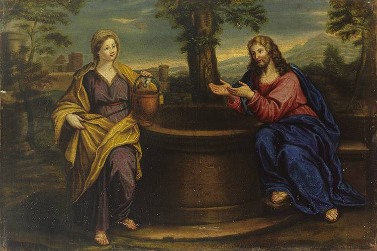 Anonymer Maler des 18. Jahrhunderts: Christus und die Samariterin am Brunnen. Öl auf Leinwand, 43,5 x 64,5 cm